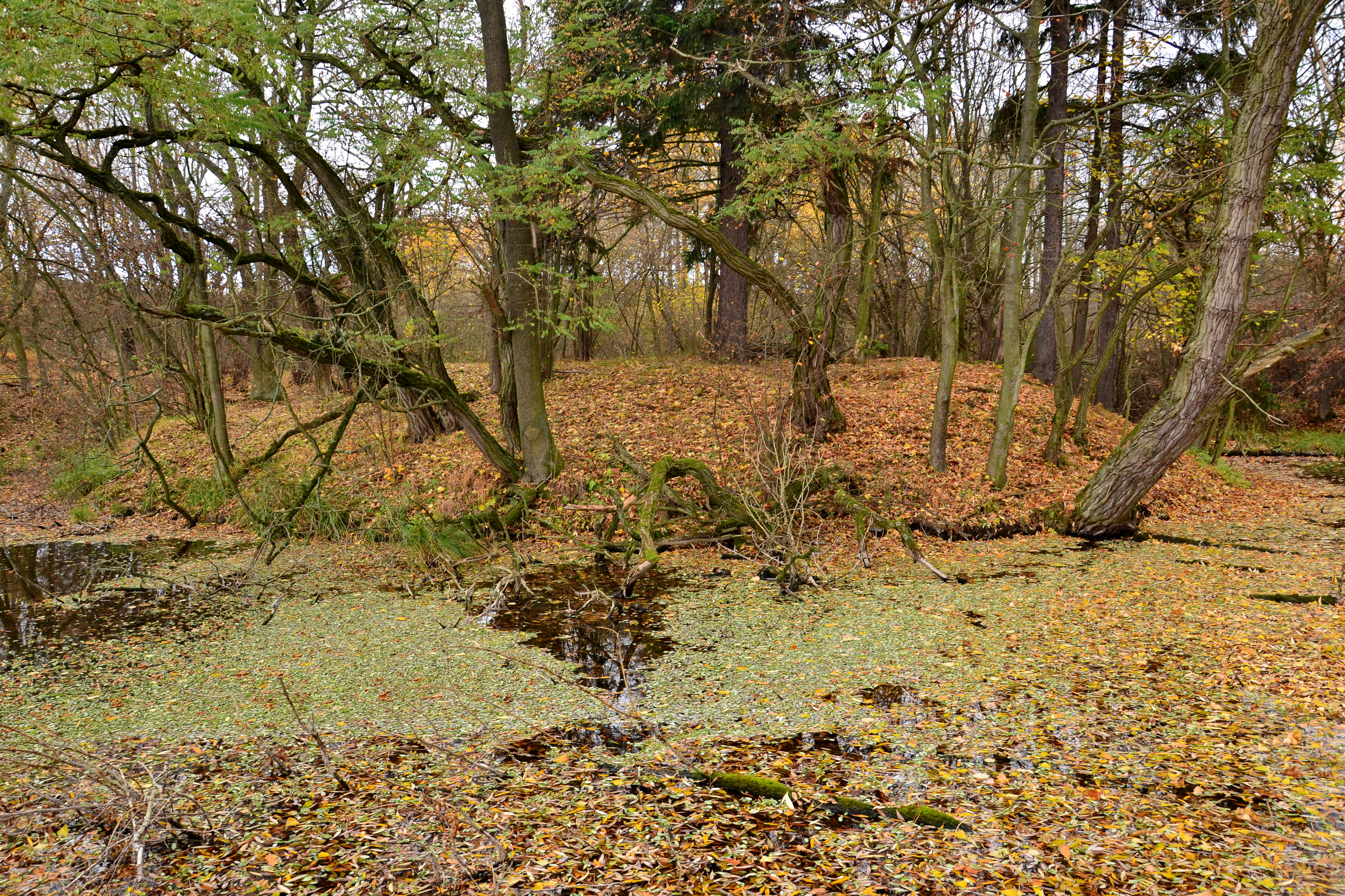 Tvrziště od východu